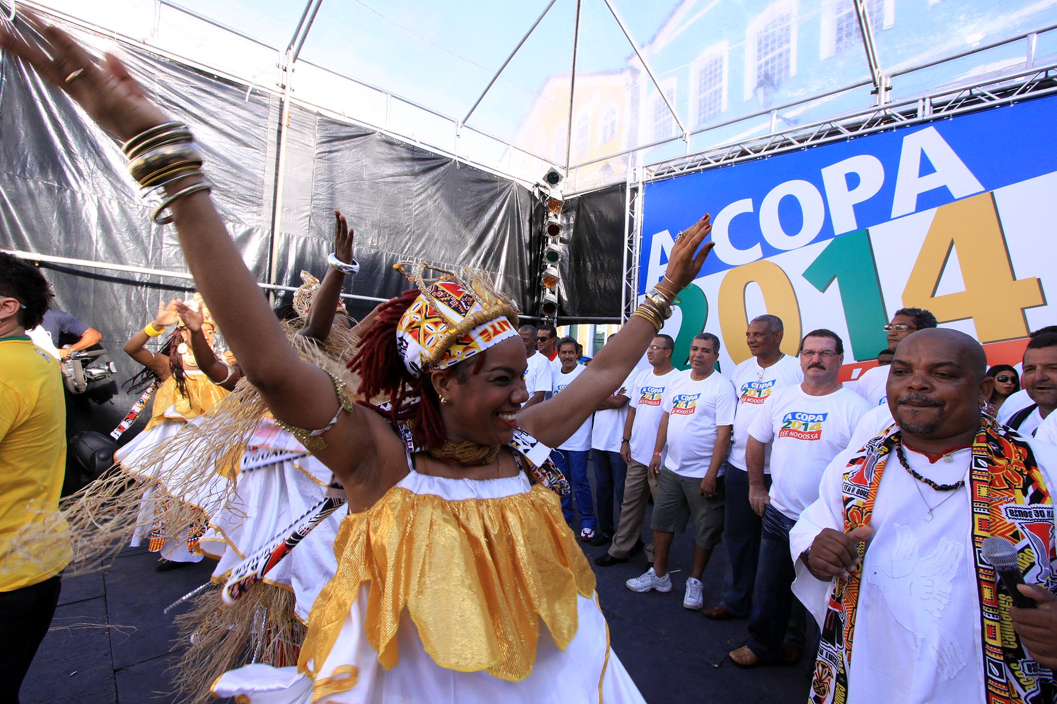 Ilê Aiyê participa da festa no Pelourinho em comemoração à escolha de Salvador como cidade-sede da Copa do Mundo de 2014 Foto: Robson Mendes / AGECOM